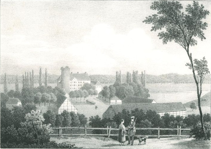 Schloss Wildenbruch, Lithographie von E. Sanne, 1846, 15 x 20,5 cm.